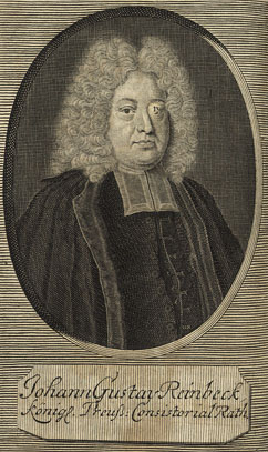 Johann Gustav Reinbeck (1683-1741).